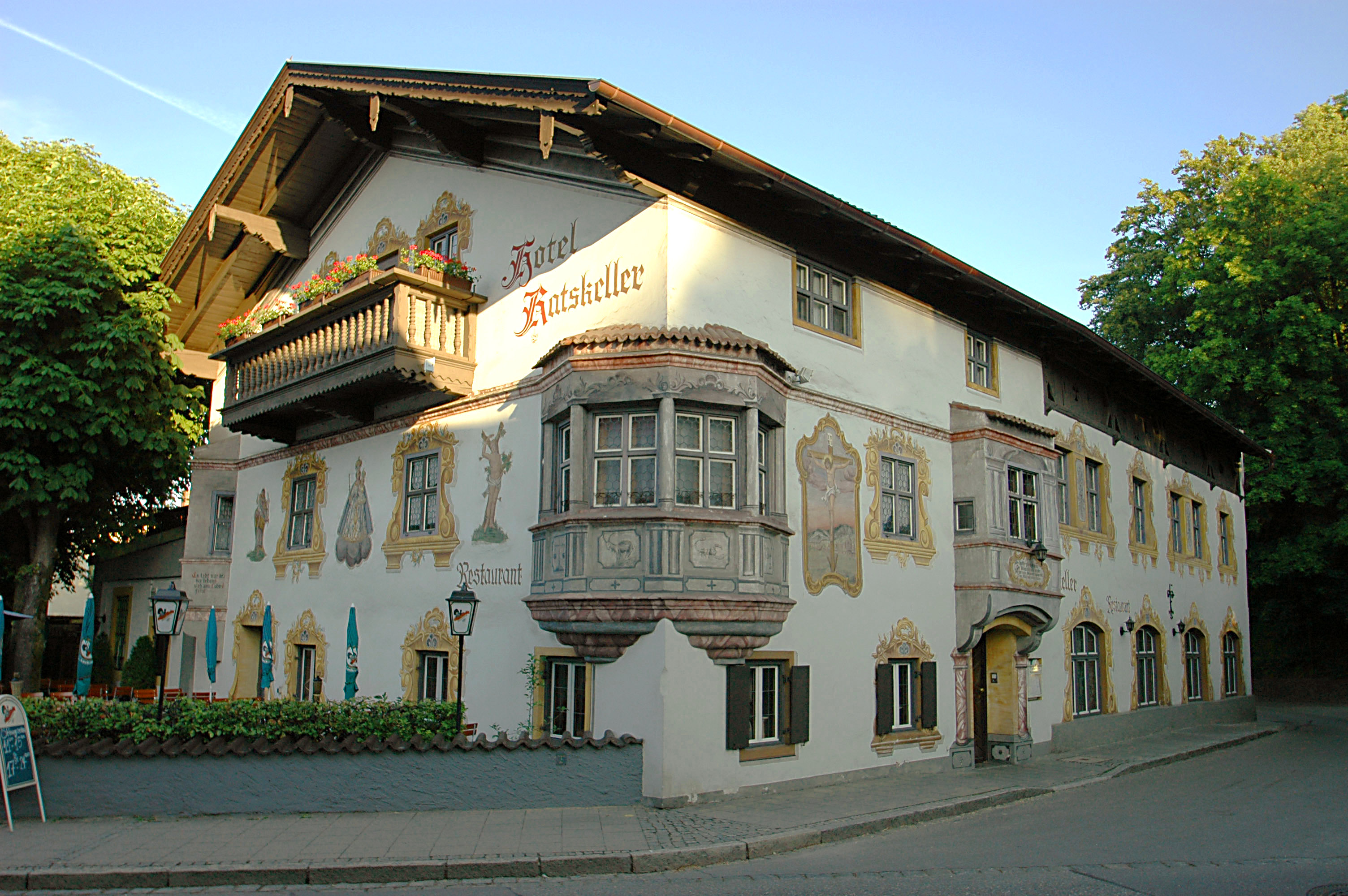 Kirchzeile 13 in Bad Aibling; Ehem. Marktschreiberhaus, jetzt Hotel, flaches Satteldach, zwei Erker, 1770, im Kern 17. Jh.This is a photograph of an architectural monument.